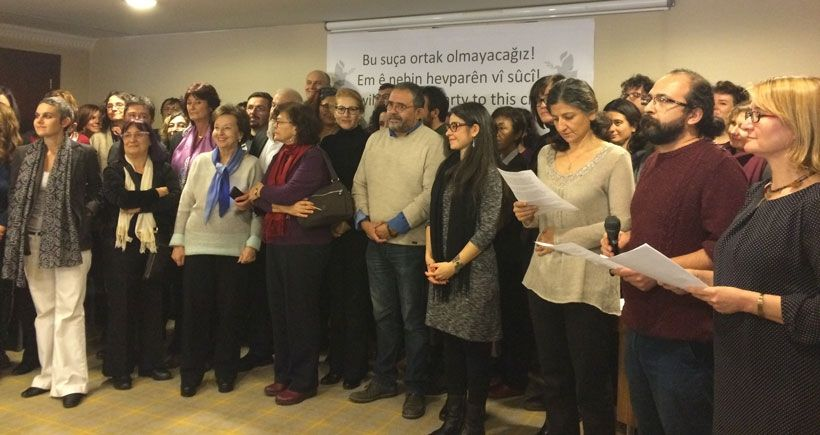 Barış İçin Akademisyenler